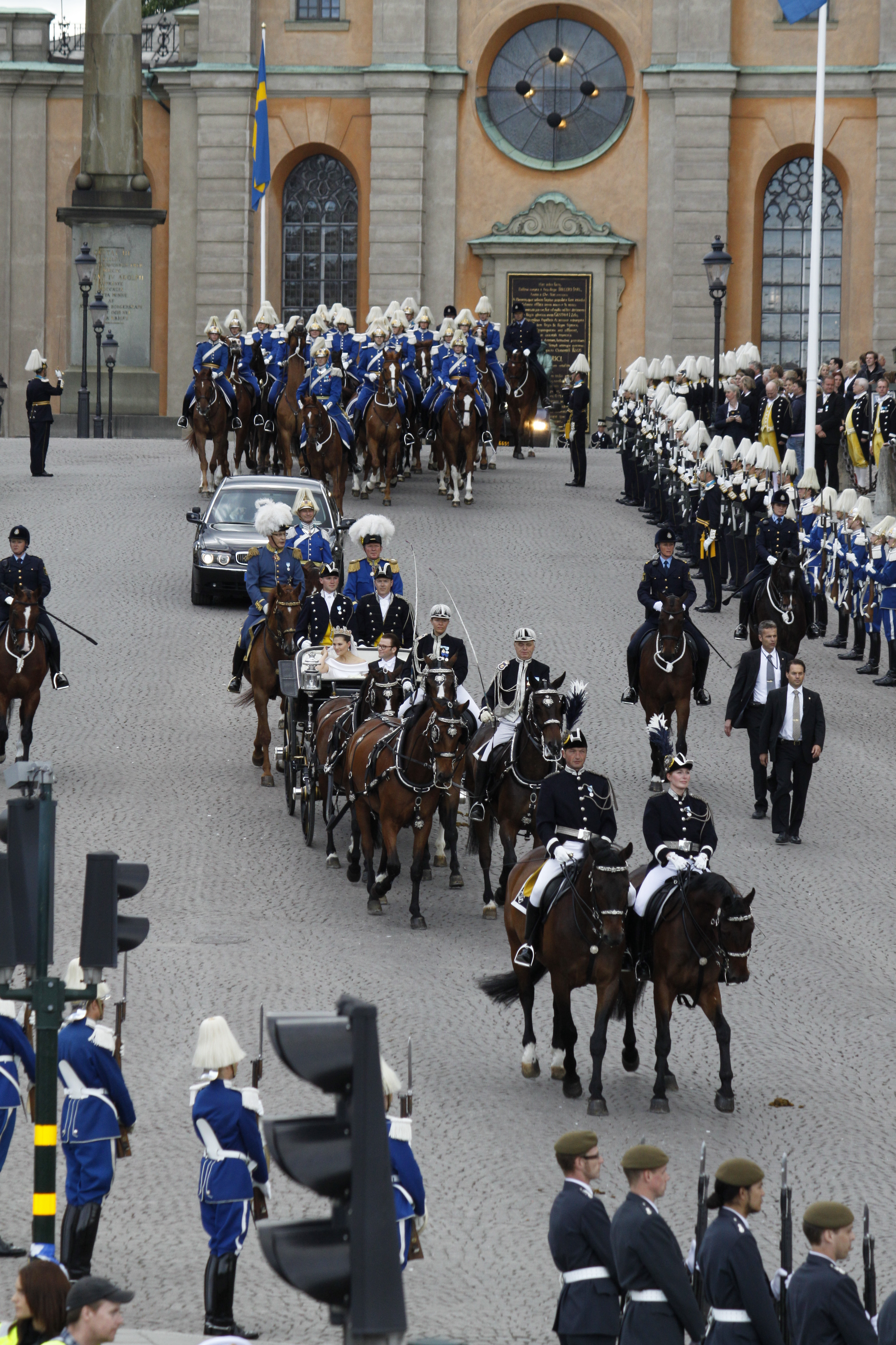 cortège